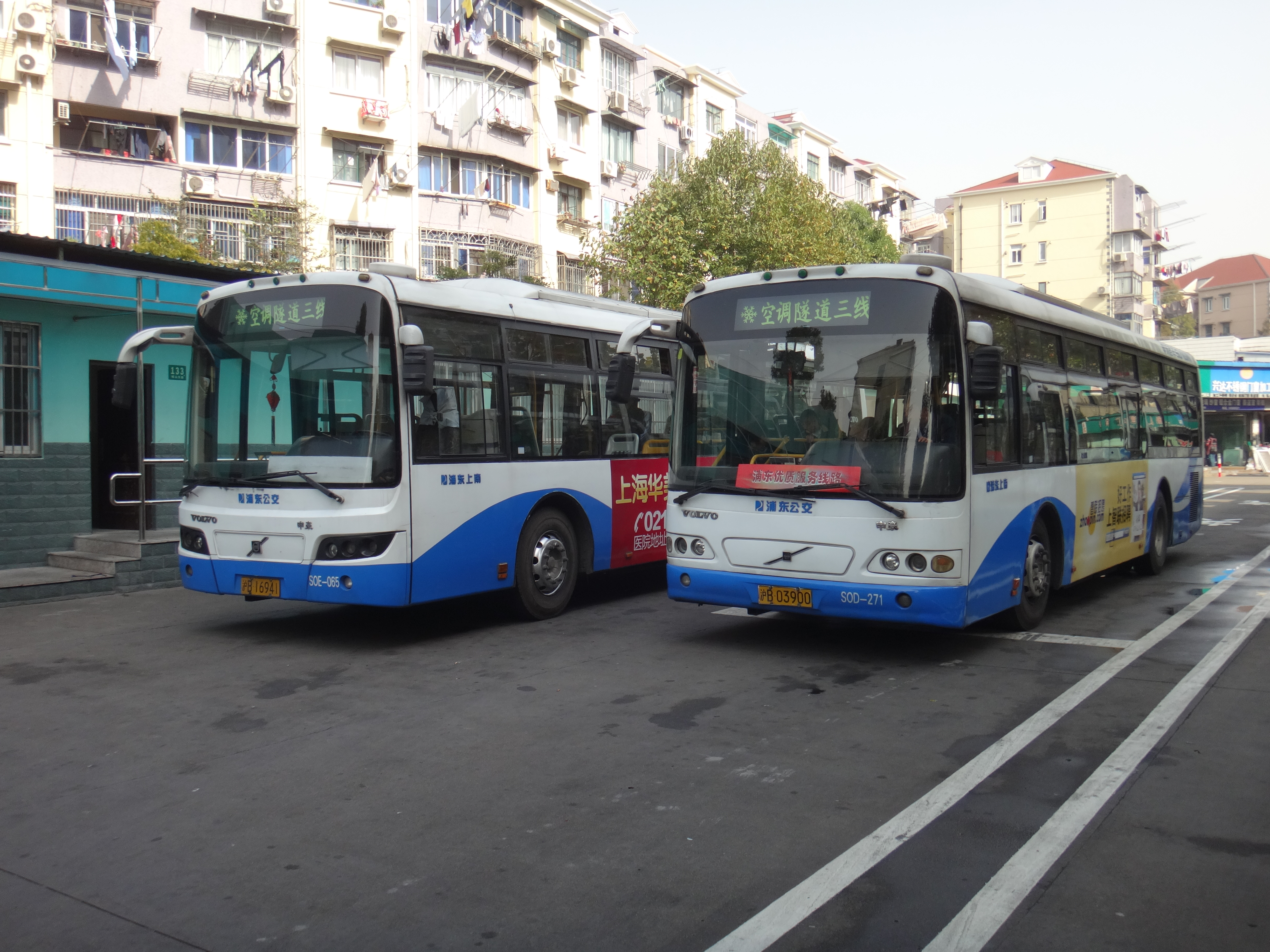 上海公交隧道三线，自编号S0D-271（右边一辆），车型SWB6100V2，摄于博山东路龙居路。